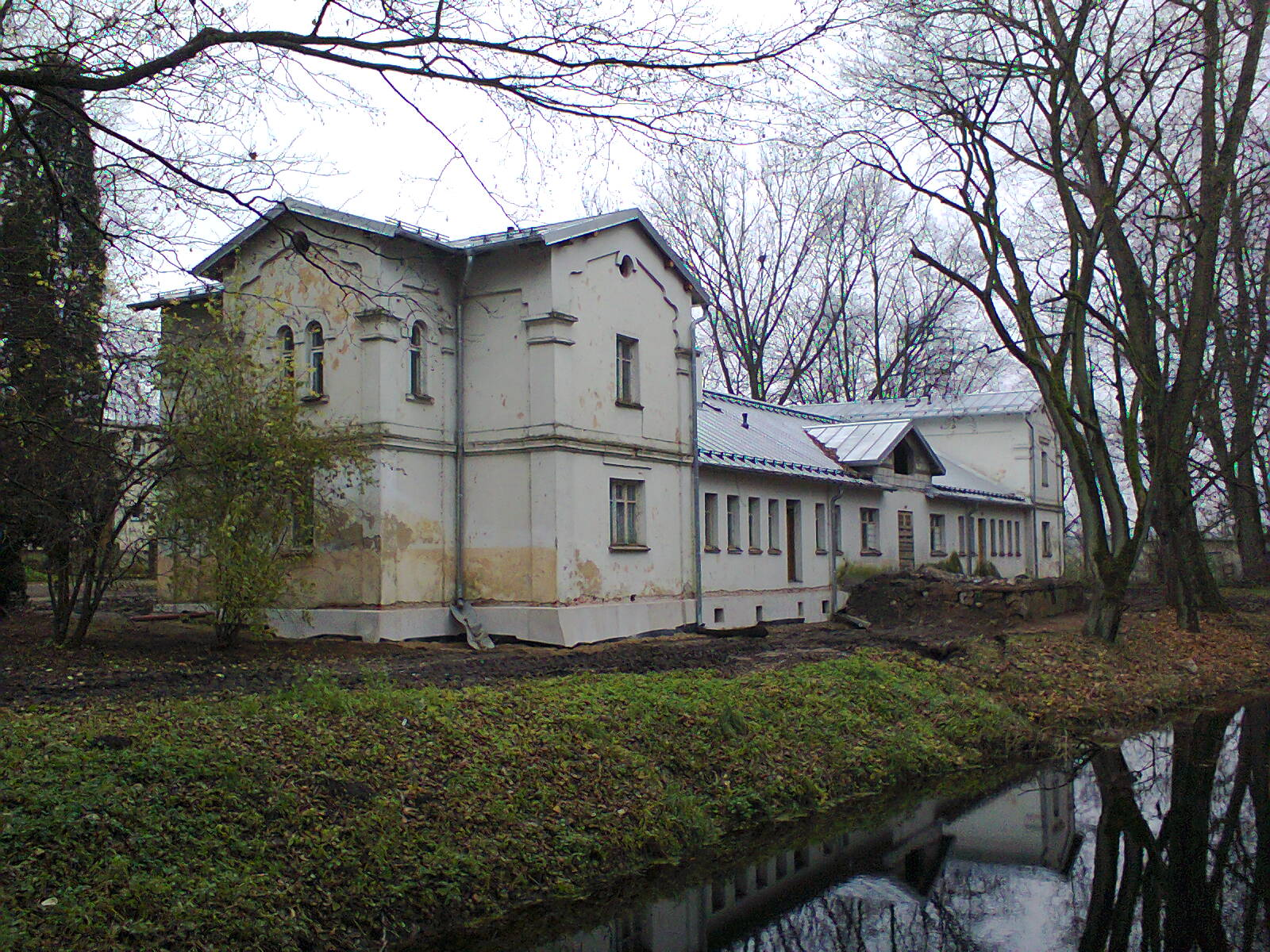 Klasycystyczny dwór w Grabowie zbudowany w latach 1852-1865